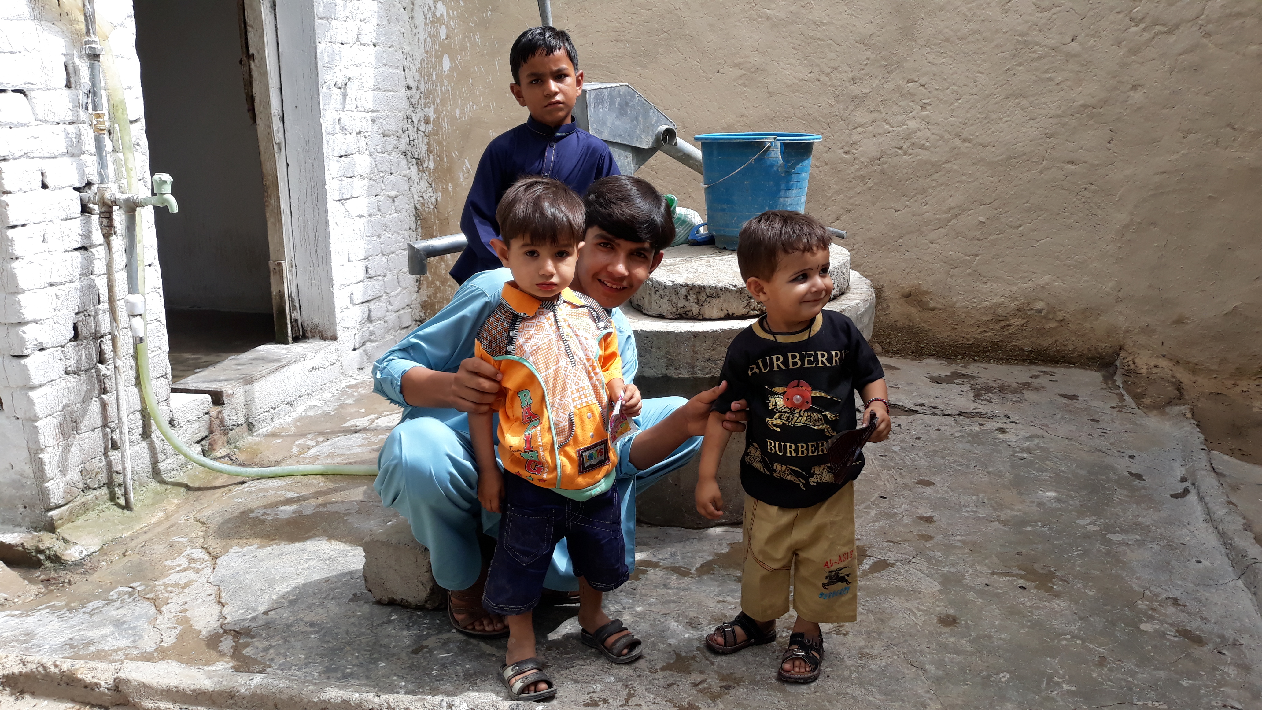 PHOTO BY UMAR MUNIR ORAKZAI786